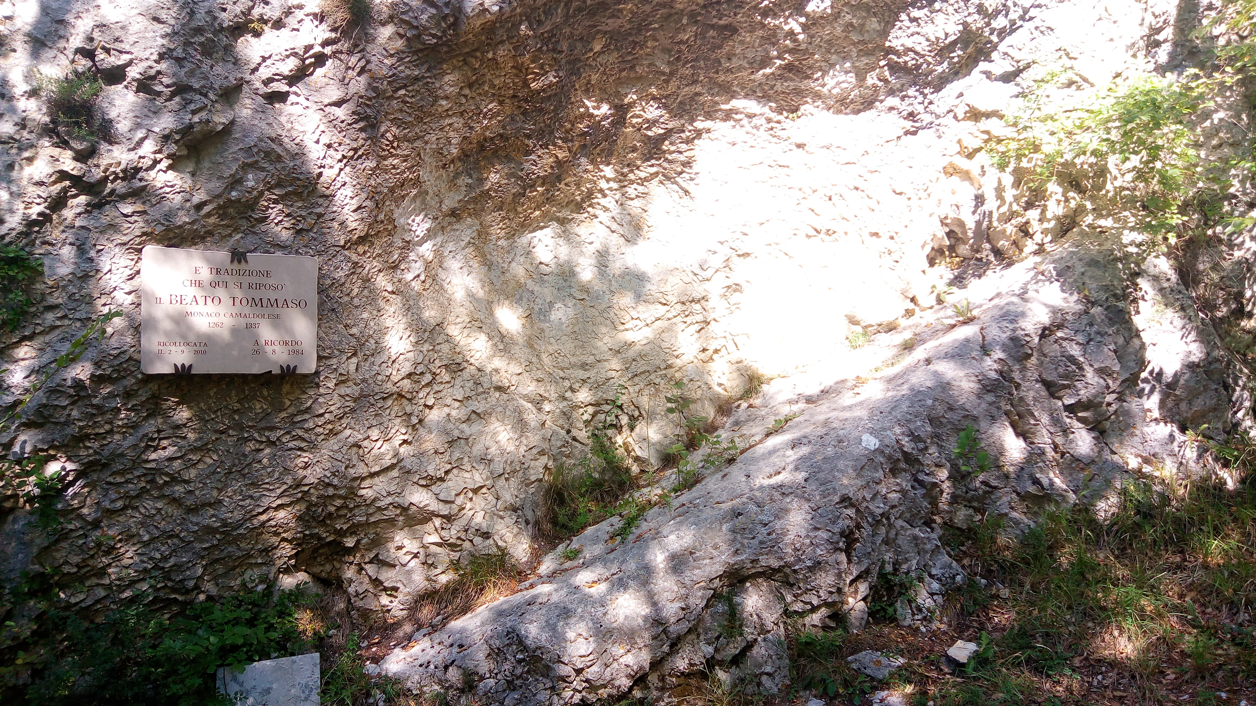 Pietra del Monte Cucco su cui, secondo la tradizione popolare, si riposava il beato Tommaso da Costacciaro, monaco ed eremita camaldolese.